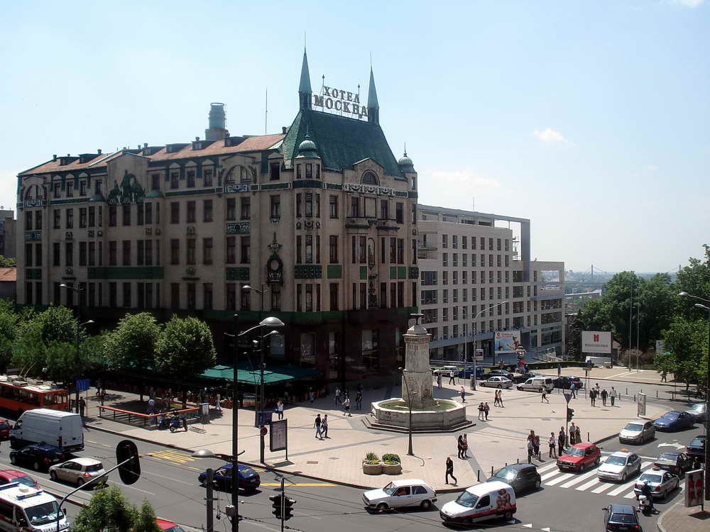 Terazijska česma. Beograd.